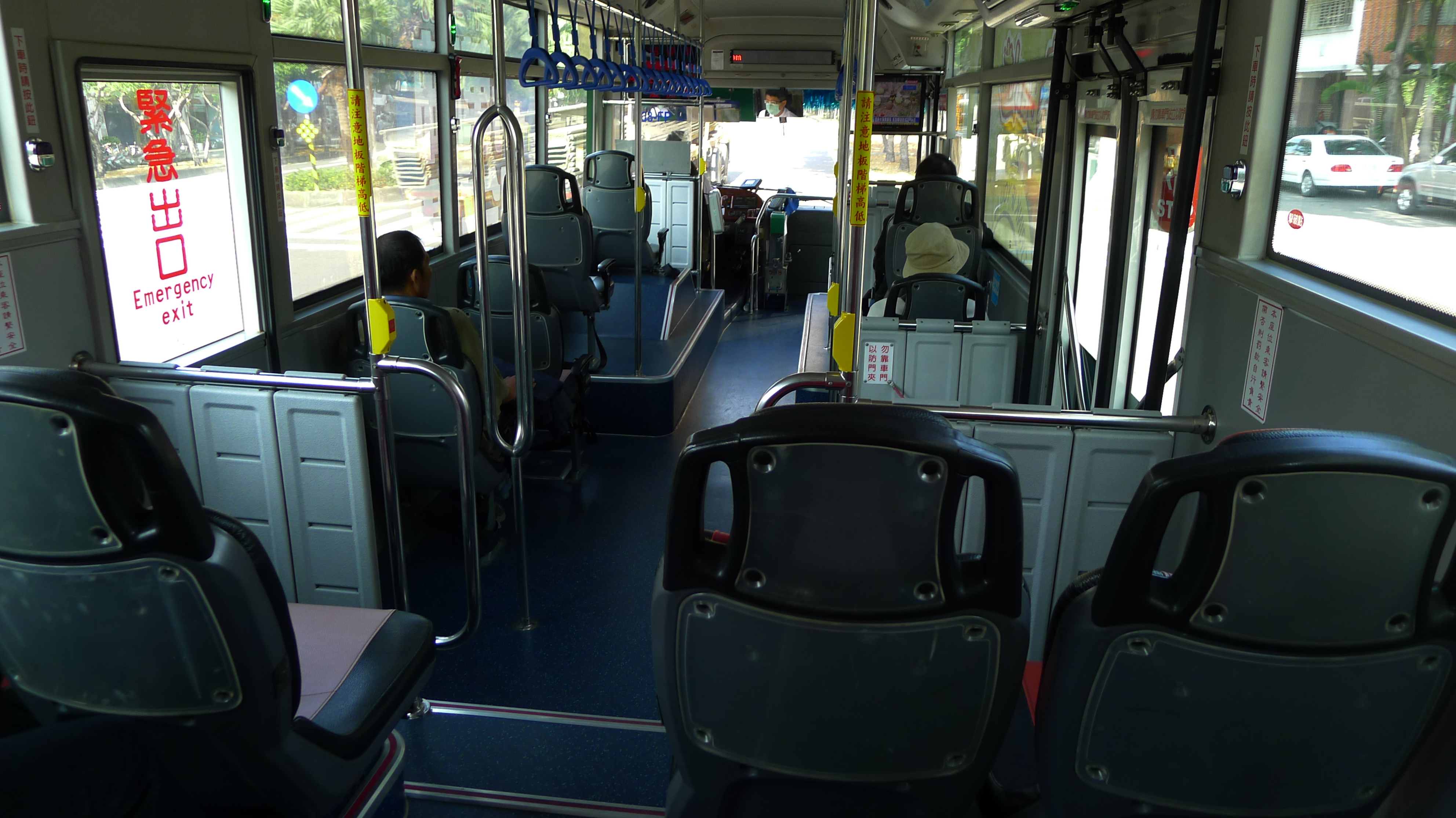 中文（台灣）: 漢程客運大宇製168公車內裝